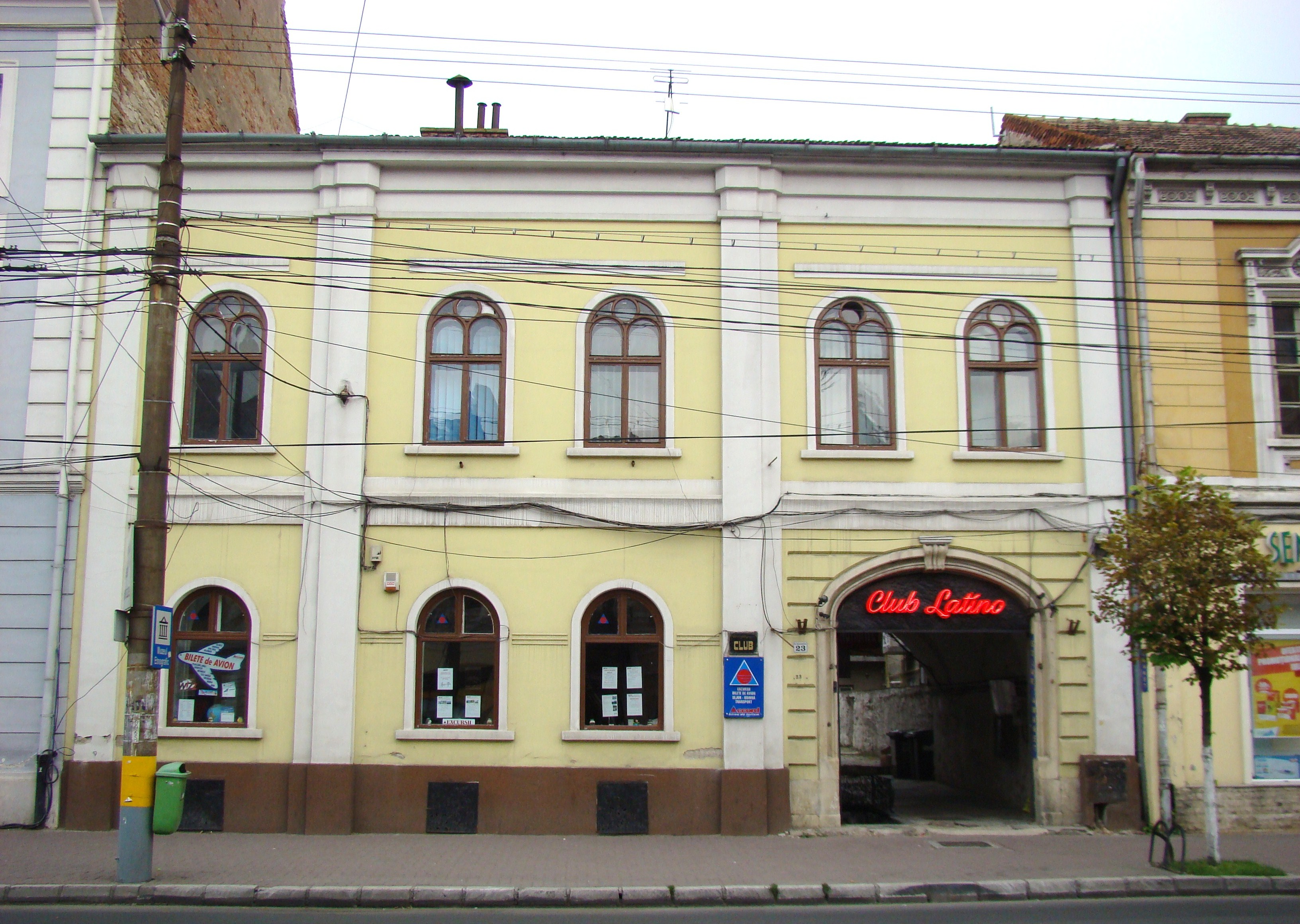 Clădire monument istoric, str. Memorandumului, nr. 23